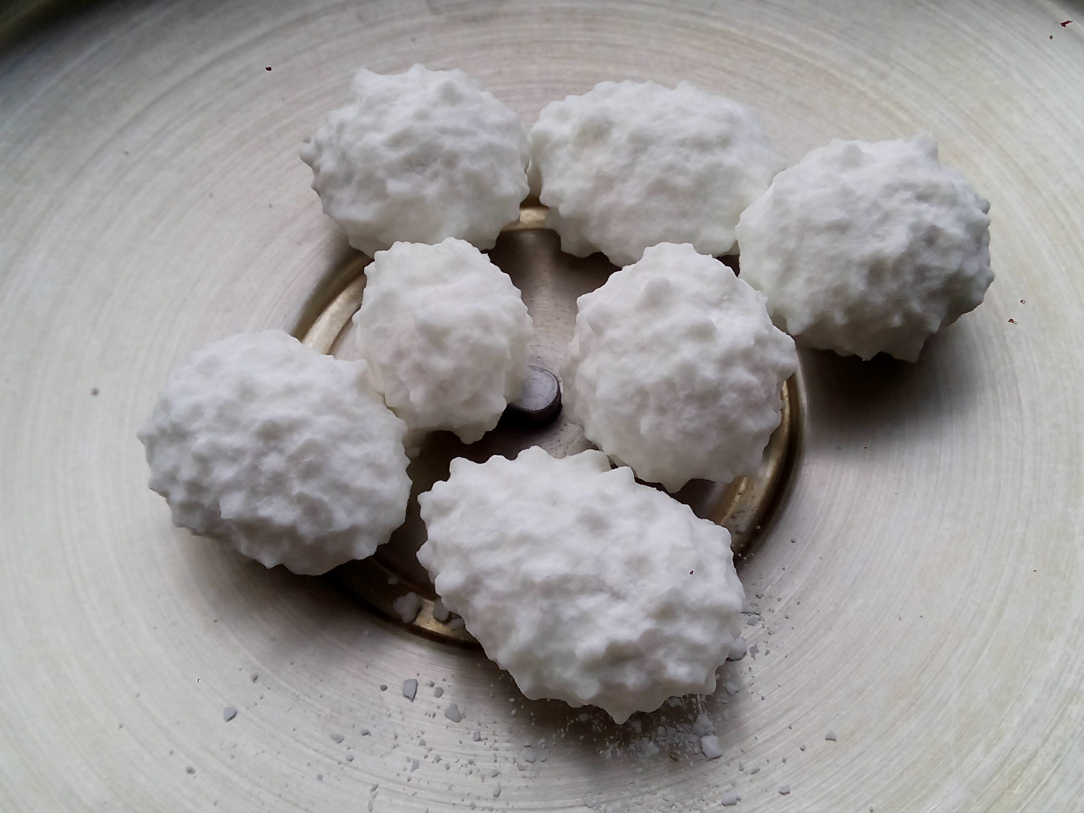 mandorle ricce su un coperchio